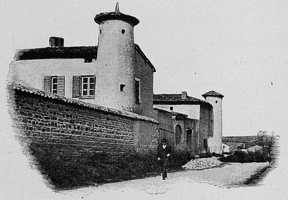 Dictionnaire illustré des communes du département du Rhône. Tome 1 / par MM. E. de Rolland et D. Clouzet.